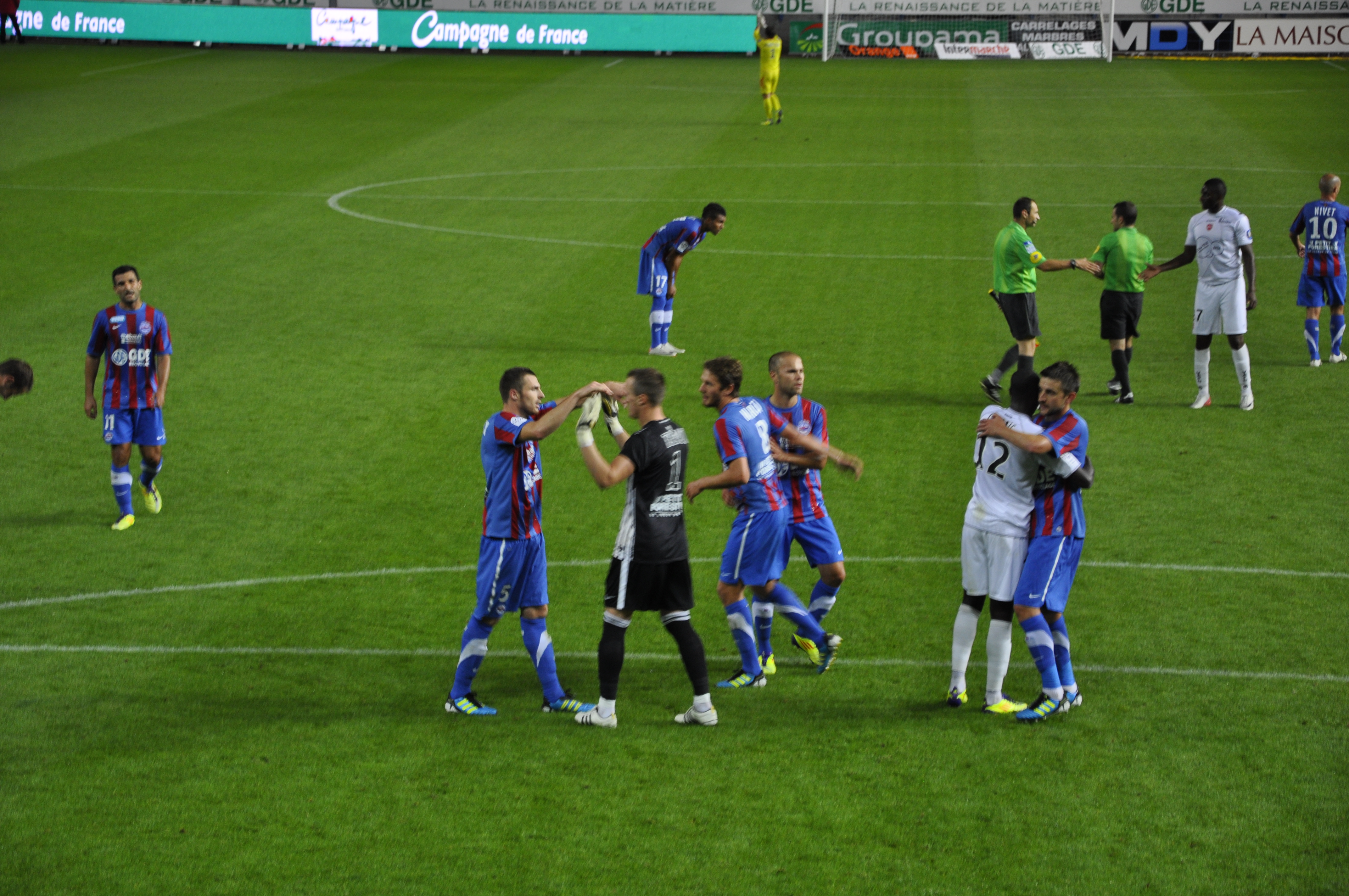 fin du match entre Caen et Valenciennes pour le compte de la première journée du championnat de D1 2011/2012